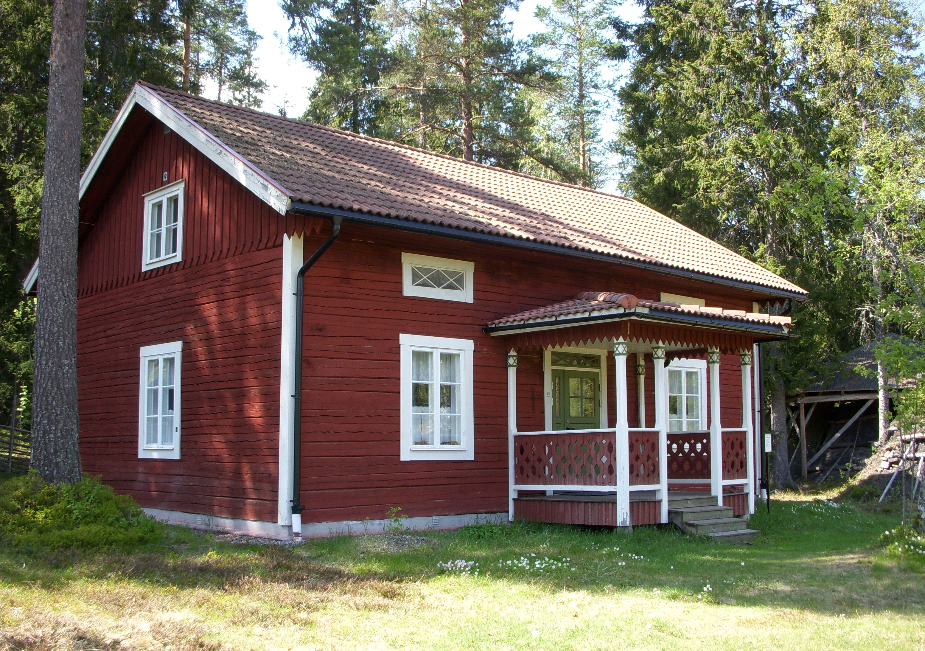 Finngammelgården vid Skattlösberg i Dalarna, Otto Blixt samlingar